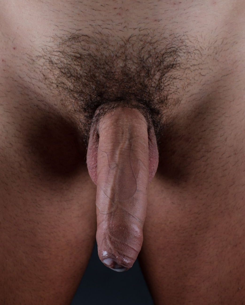 Pene no cortado, dicha foto esta realizada por un fotografo profesional. Esta en estado de semierecion